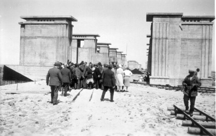 Kiekje uit familiealbum Kohnstamm